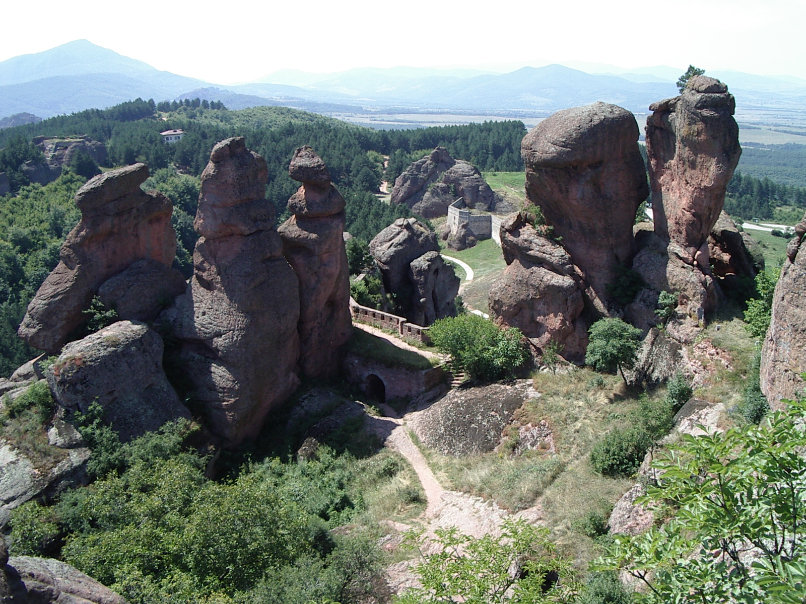 Belogradchik castle - Bulgaria